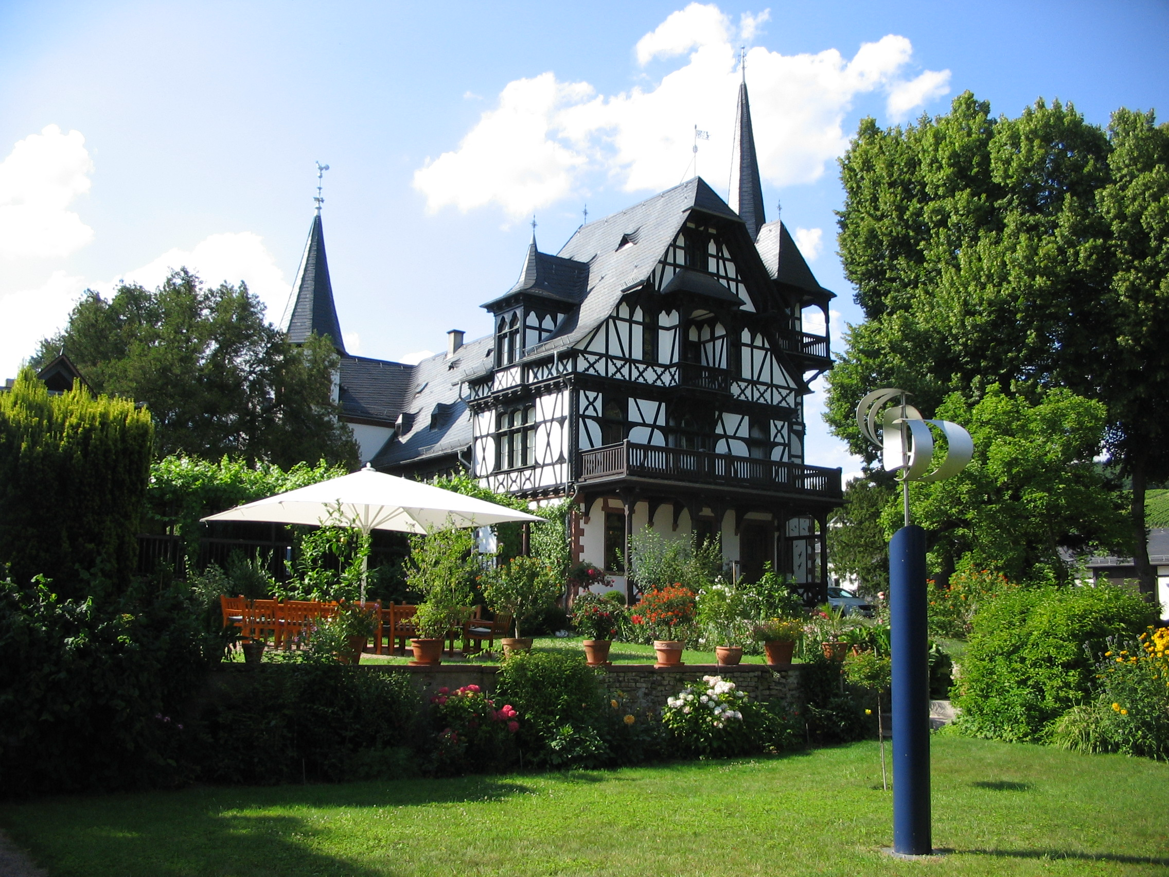 Früherer Wohnsitz des Baronet Sir John Sutton in Kiedrich; nach seinem Tod seit 1875 Stammhaus des Weinguts Robert Weil; Blick vom Zugang Marktstraße